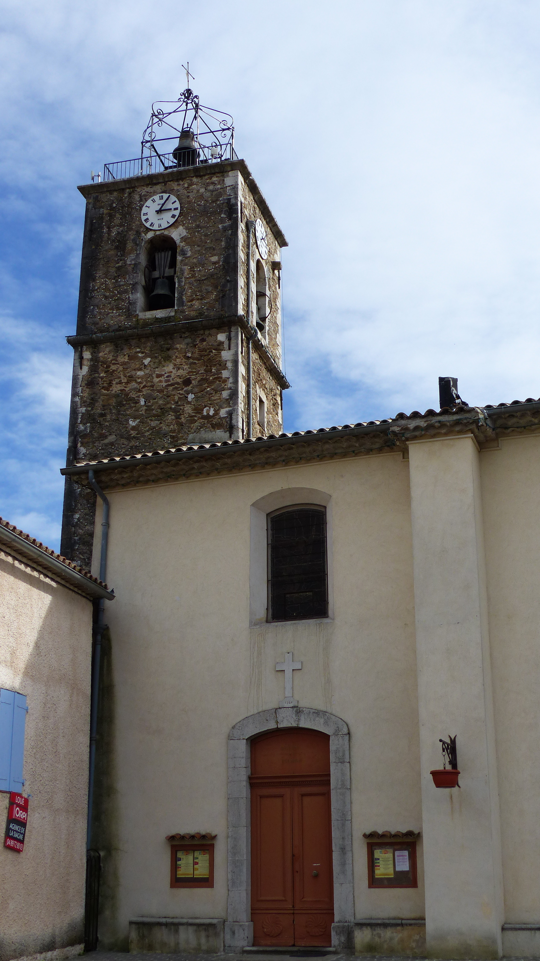 Église St Pierre à PEGOMAS (06)